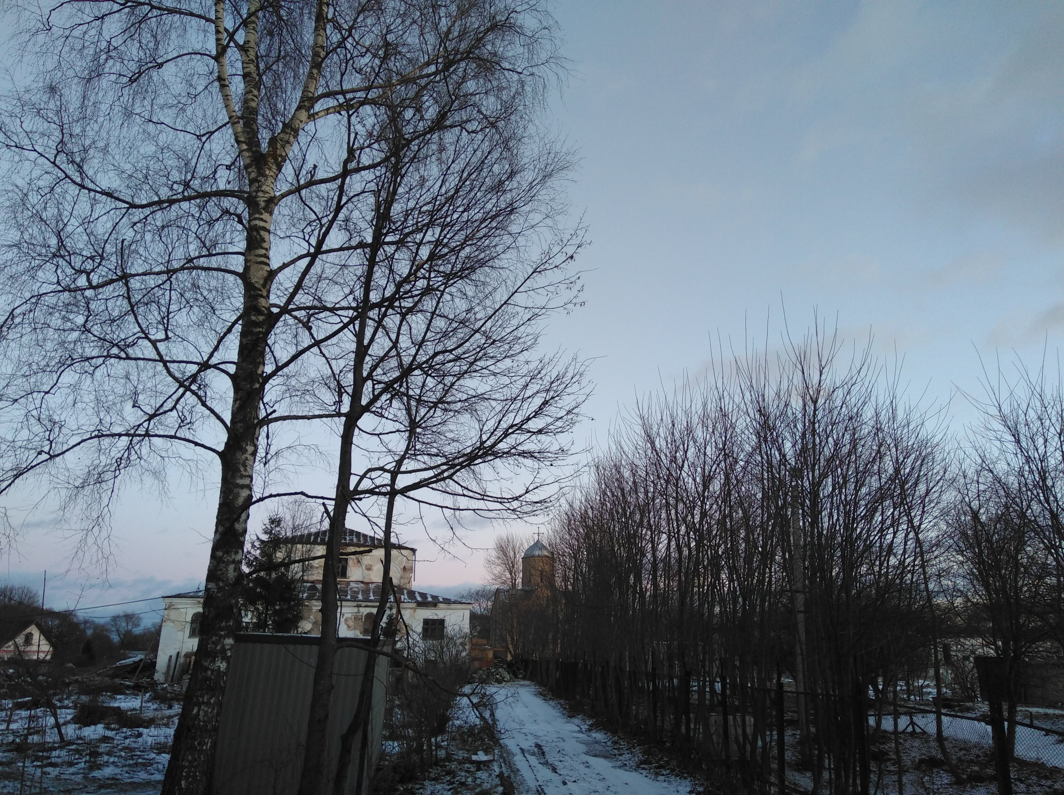 Местность Холм на юге Славенского конца Торговой стороны Новгорода, где расположены Церковь Ильи Пророка на Славне и Церковь Петра и Павла на Славне